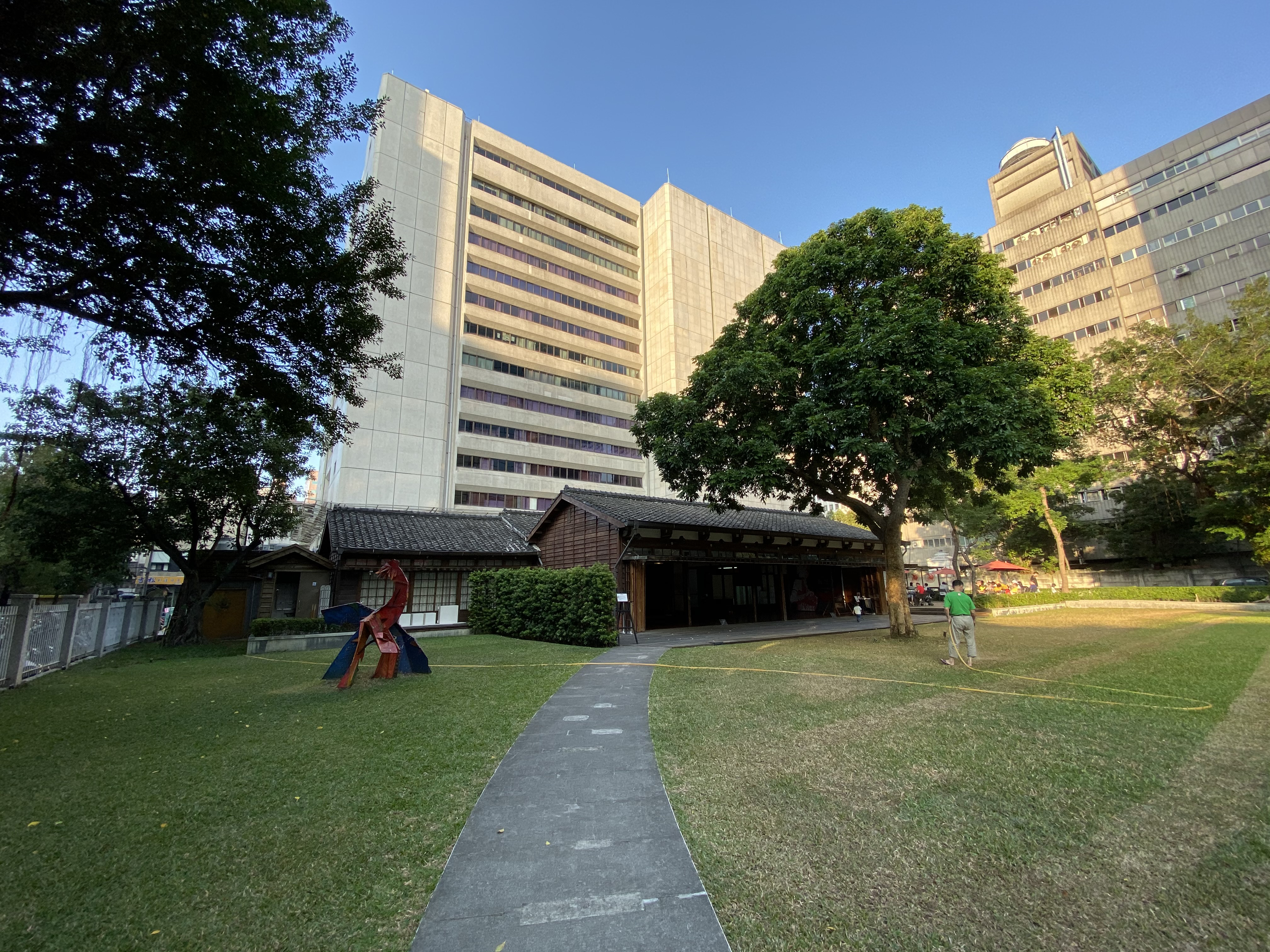 中文（台灣）: 蔡瑞月舞蹈研究社（前）、台北富邦銀行中山大樓（後）。